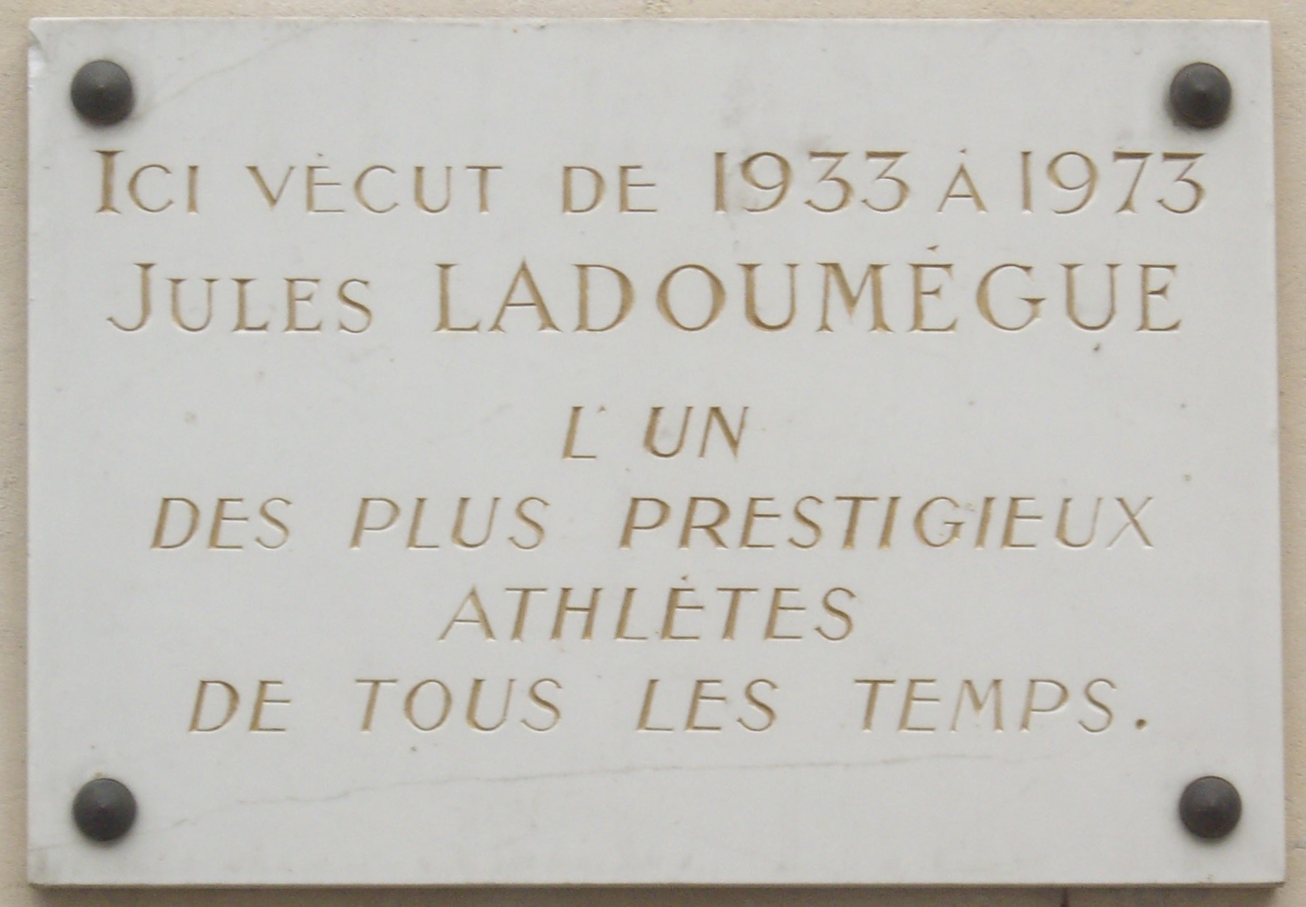 Plaque commémorative, 19 rond-point André-Malraux, Boulogne-Billancourt. « Ici vécut de 1933 à 1973 Jules Ladoumègue, l'un des plus prestigieux athlètes de tous les temps. »